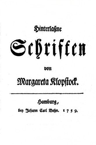 Deckblatt der posthumen Ausgabe von Meta Klopstocks gesammelten Werken.